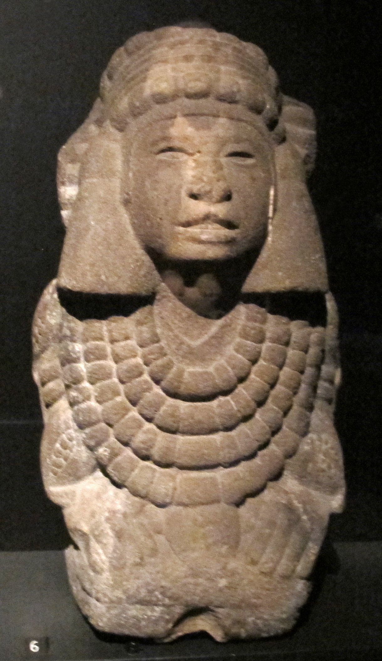 Musée du quai Branly